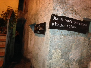 ingresso